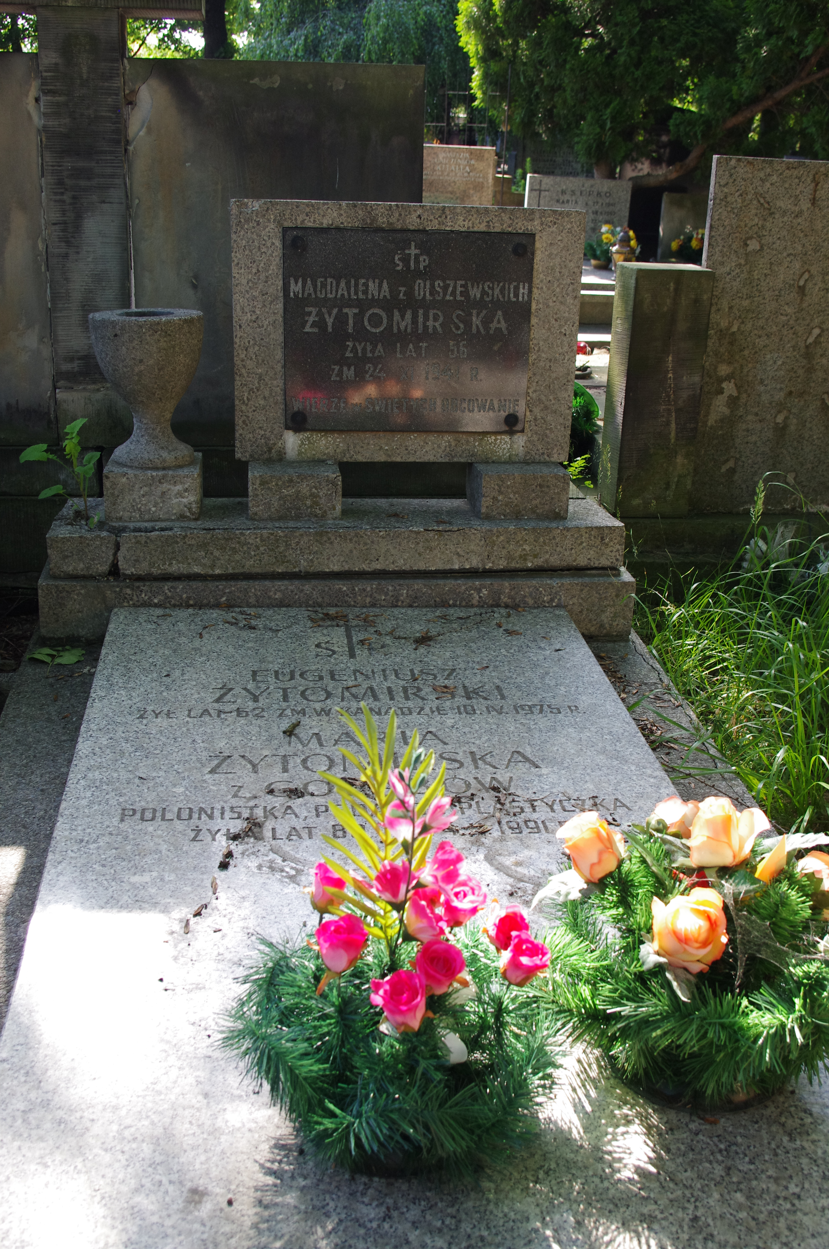 Grób poety Eugeniusza Żytomirskiego na Starych Powązkach w Warszawie